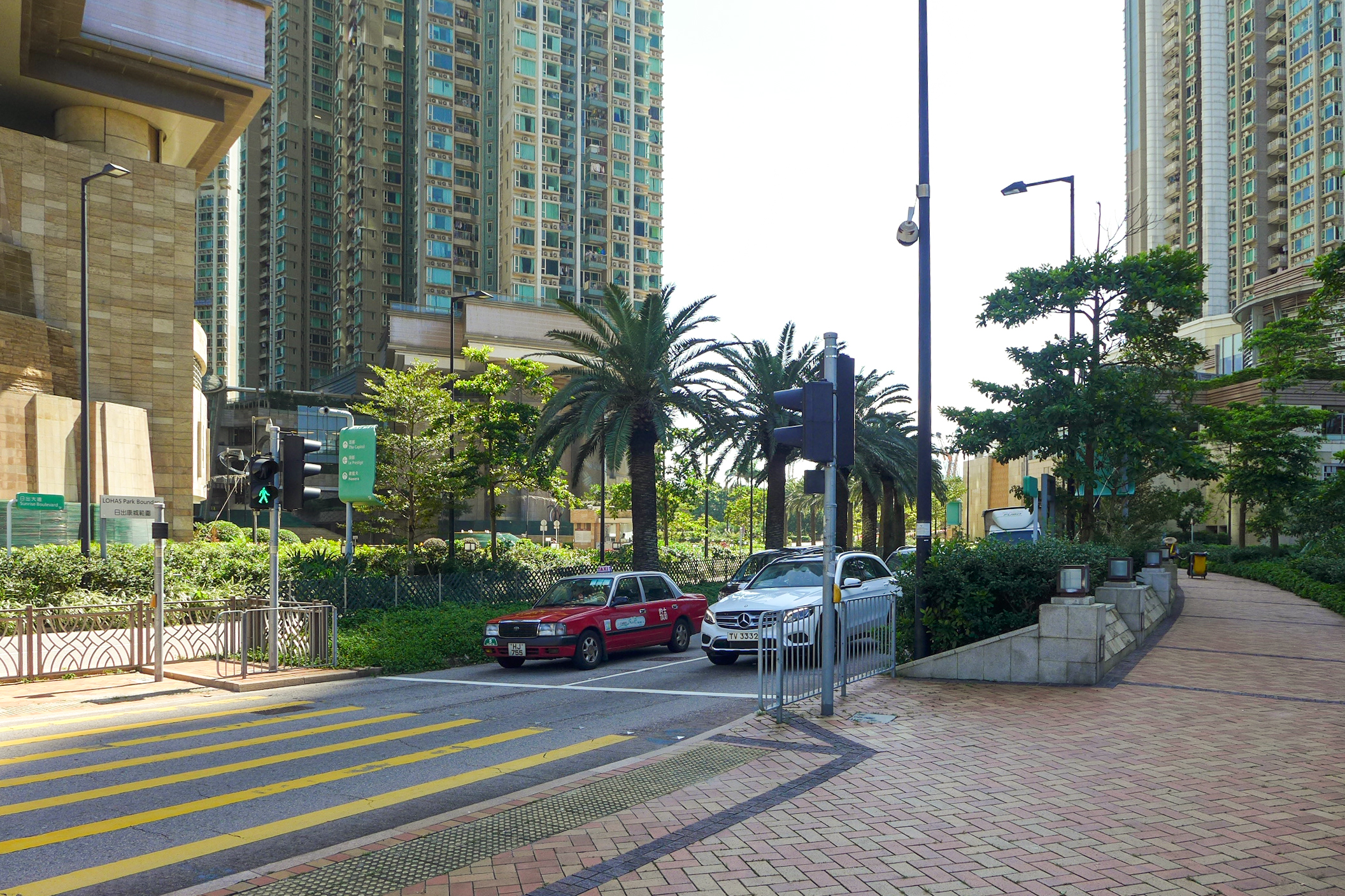 LOHAS Park Sunrise Boulevard